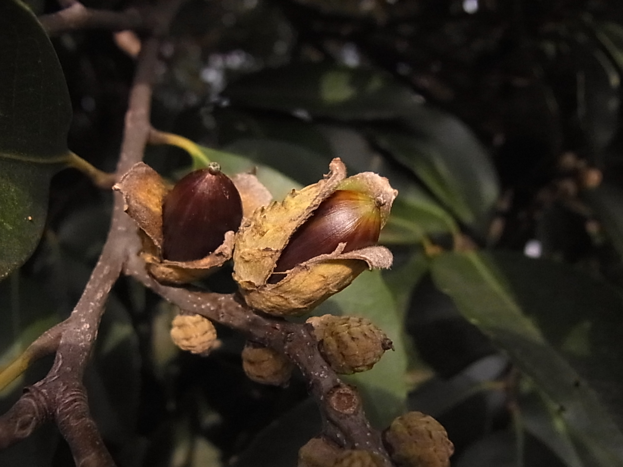 スダジイ（学名Castanopsis sieboldii）のドングリ